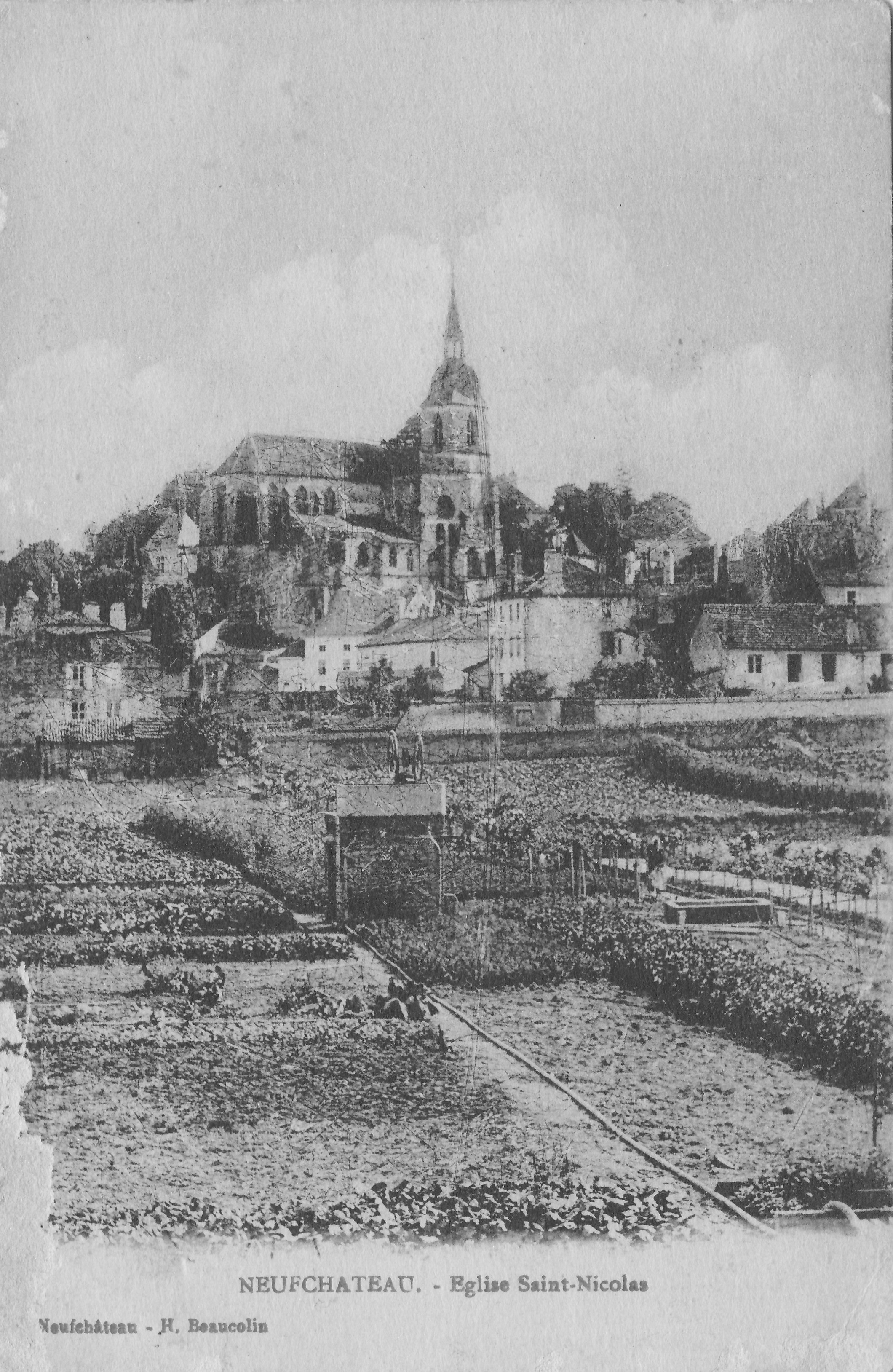 Carte postale ancienne montrant l'église de Neufchateau au début du 20ème siècle